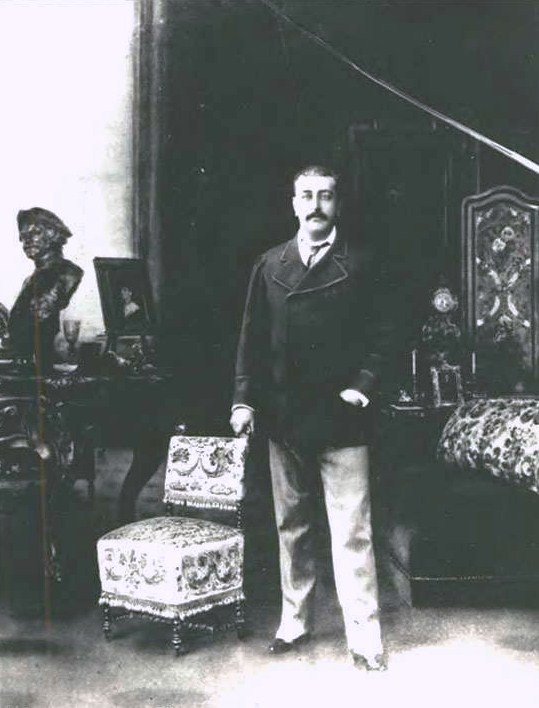 Pavel Pavlovich Demidov